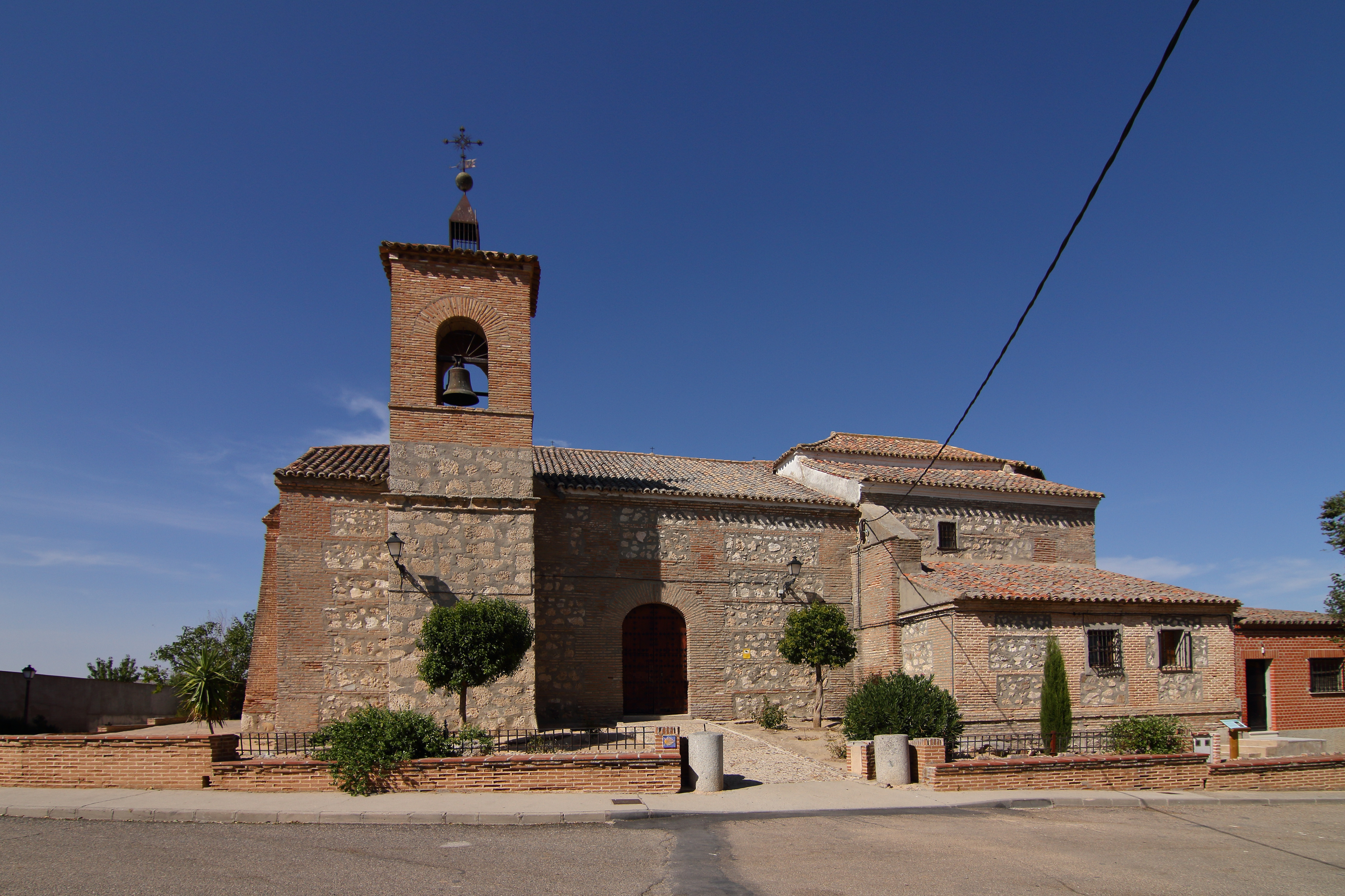 Rielves, Iglesia parroquial de Santiago Apóstol, fachada principal